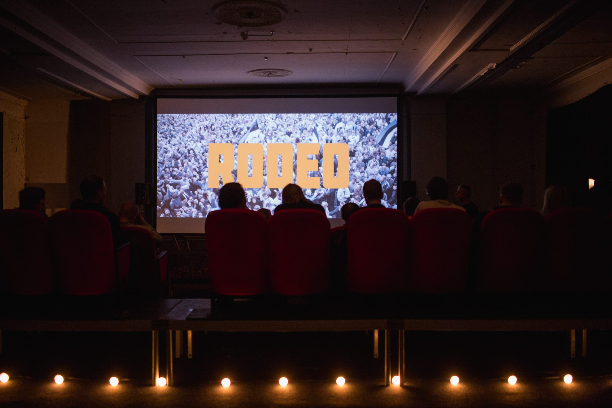 Märt Kose foto dokumentaalfilmi "Rodeo" EÜSi eriseanss Tartu Elektriteatris. Film räägib Mart Laari esimesest valitsusest ja selle režissöörid on Raimo Jõerand ja Kiur Aarma. (Laar ja Aarma on EÜSi vilistlased)